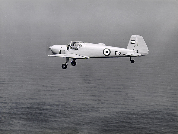 الطائرة بيست مان بي يو 181 " الجمهورية" تابعة للقوات الجوية المصرية. الطائرة رقم 315